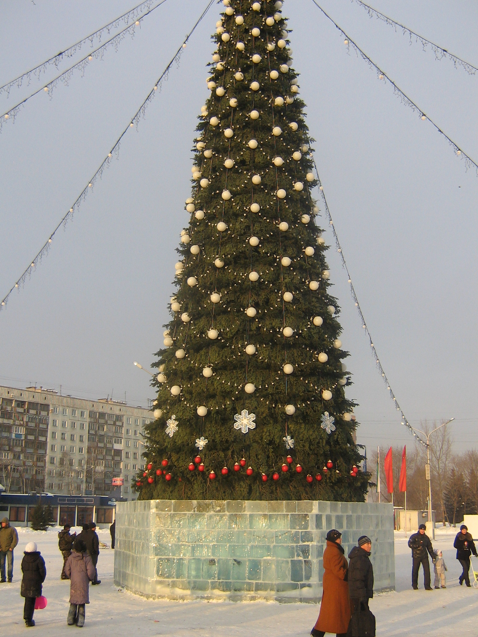 L'Albero di Natale, Piazza degli Eventi Popolari, Novokuzneck(Russia).